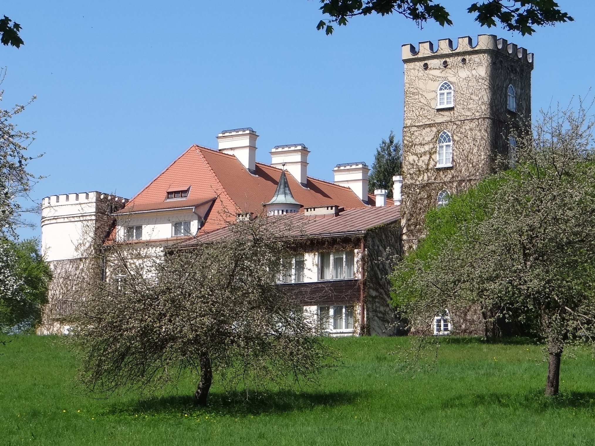 Pałac w Janowicach